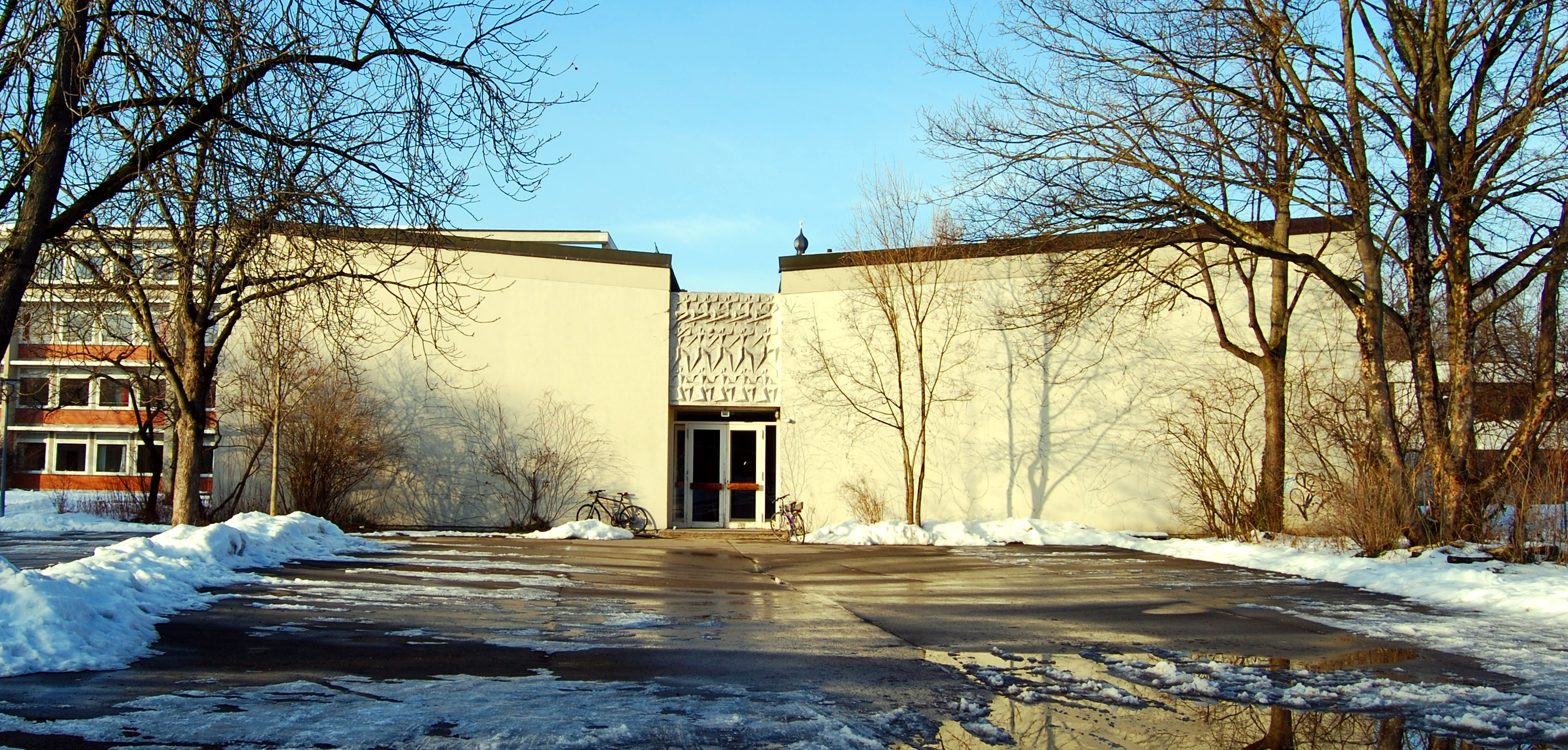 Käthe-Kollwitz-Gymnasium in München-Neuhausen, Nibelungenstraße 51